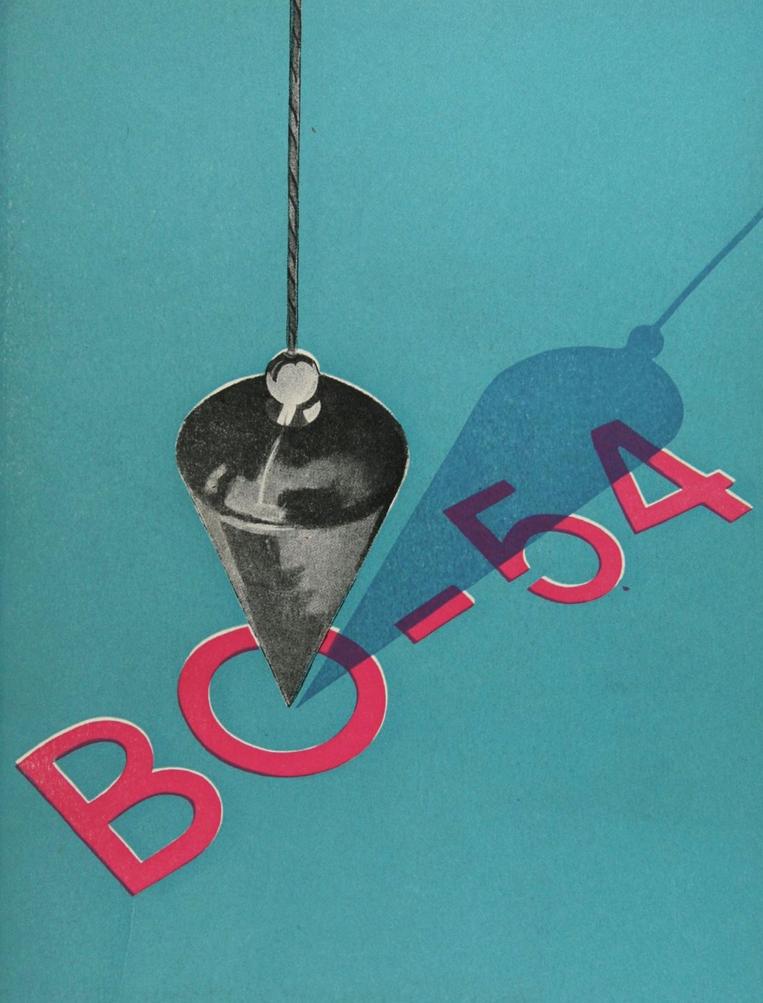 Omslag till bomässans katalog BO-54